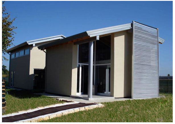 link My personal site